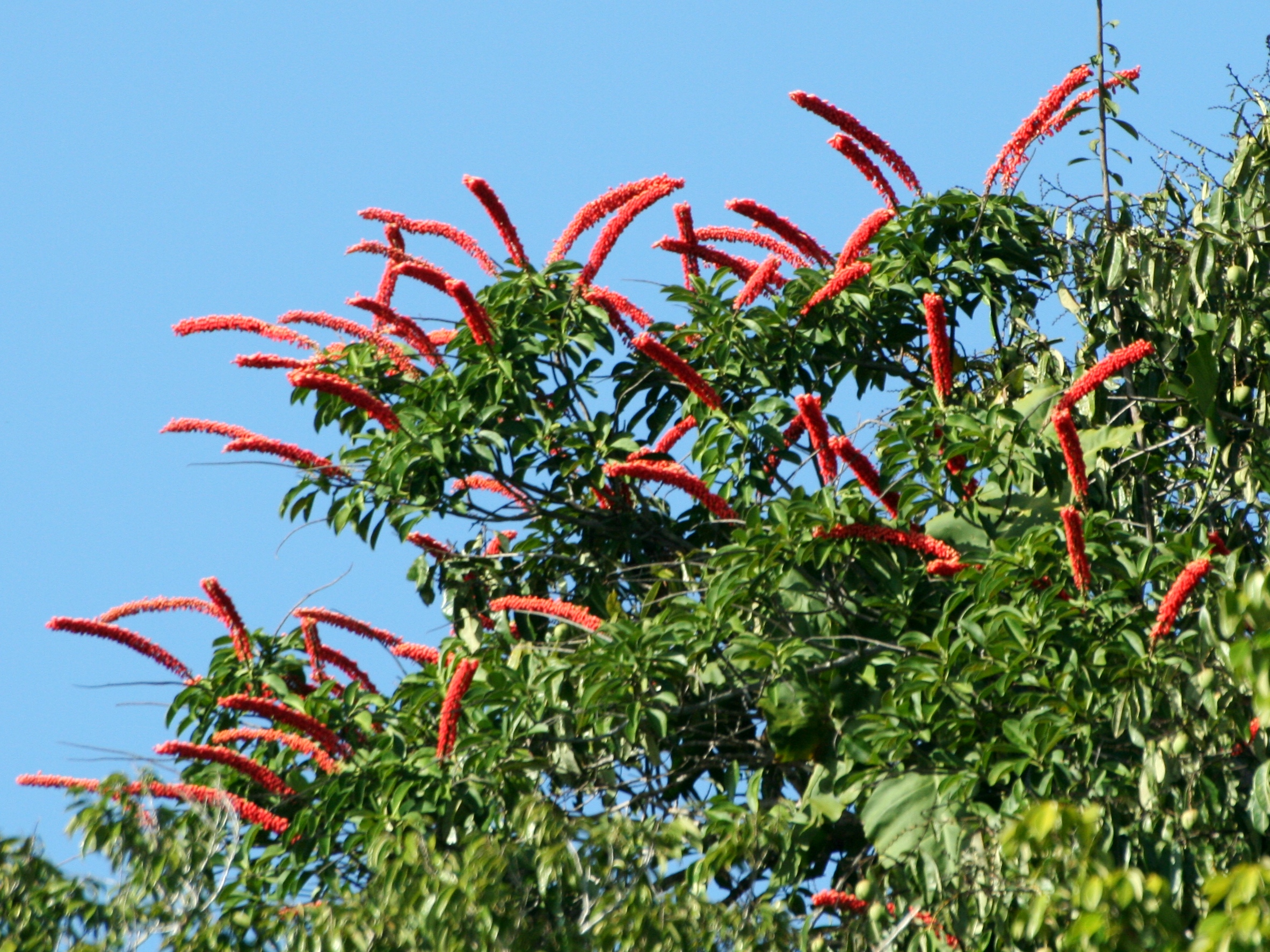 Rozkvetlá Norantea guianensis rostoucí jako epifyt v korunách stromů v povodí Rio Ventuari ve Venezuele